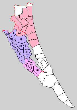 行方郡の町村